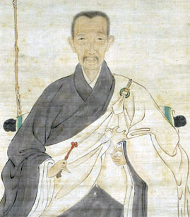 東皐心越頂相 椿椿山筆